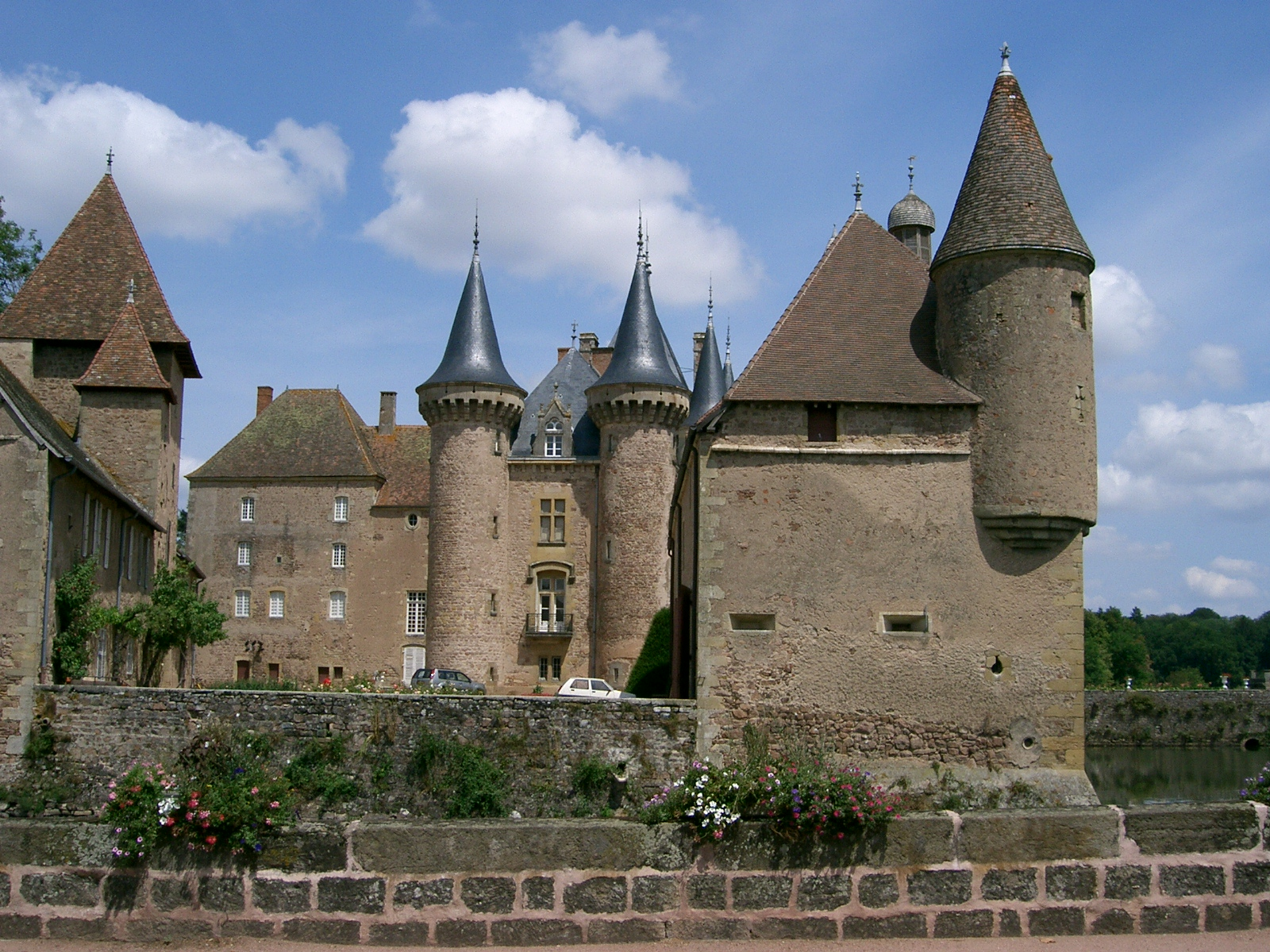 La Clayette - Bourgogne (71) - château self made PRA